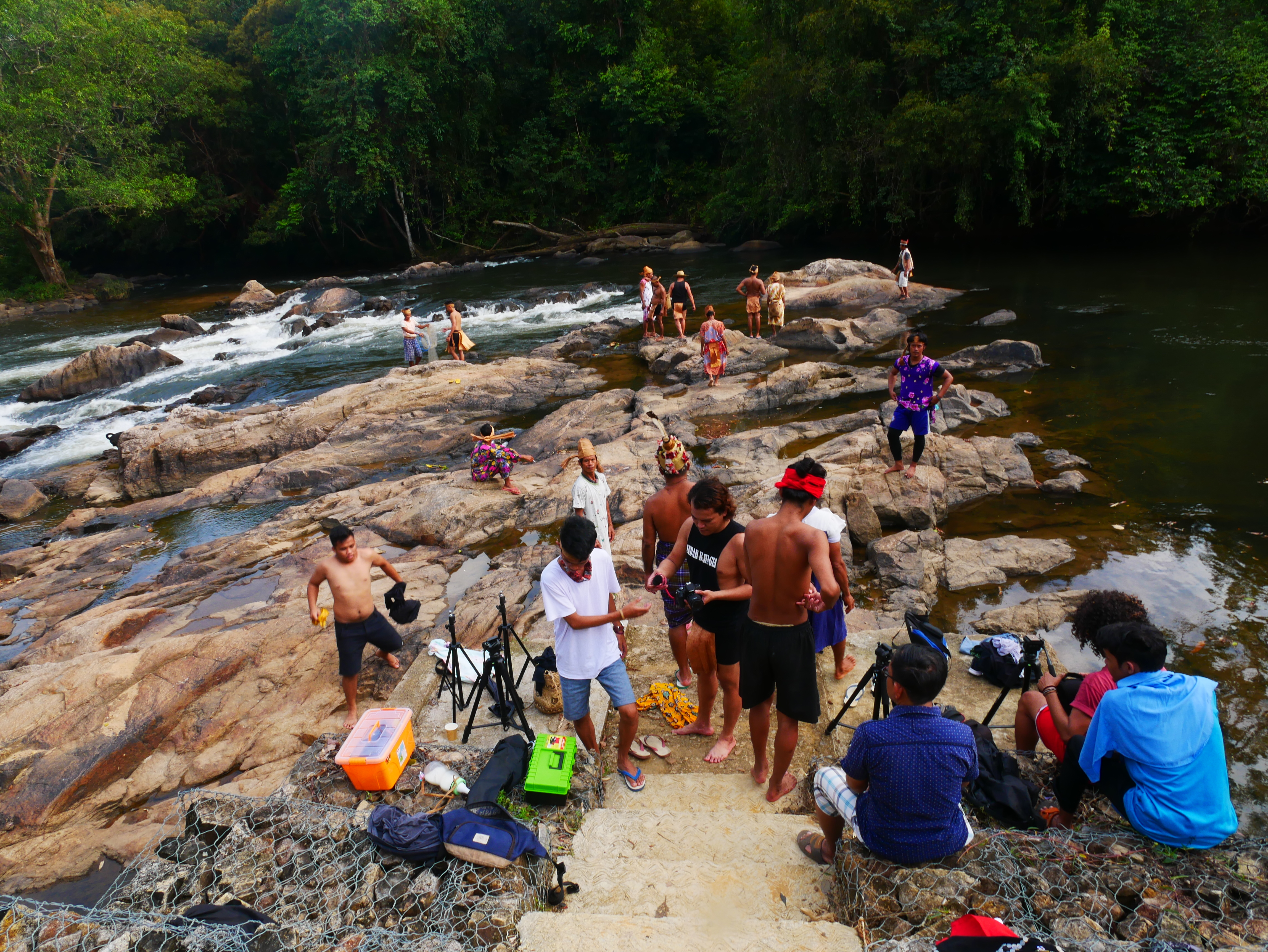 ini adalah dokumentasi pada saat syuting film Belikahan